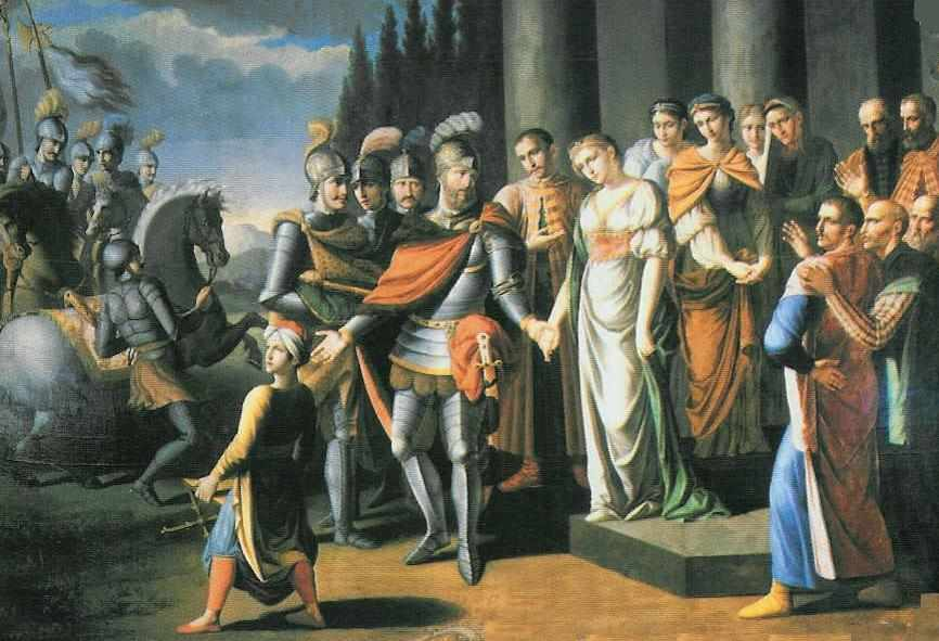 "Chodkiewicz Saying Goodbye to His Wife Before Chocim"